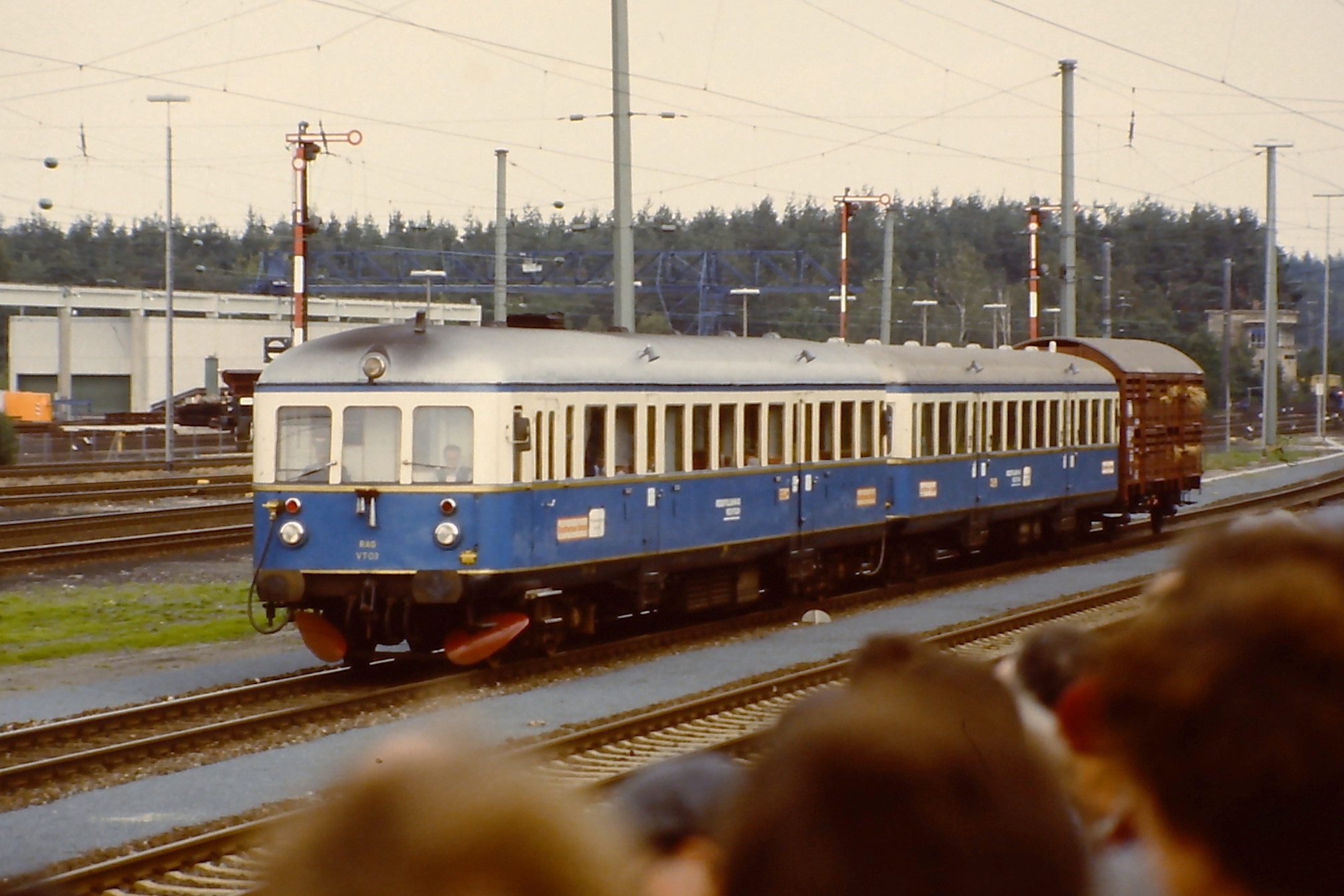 VT 03 mit Steuerwagen der Regentalbahn (RAG) mit Viehtransportwaggon bei der Jubiläumsparade 150 Jahre deutsche Eisenbahn in Nürnberg